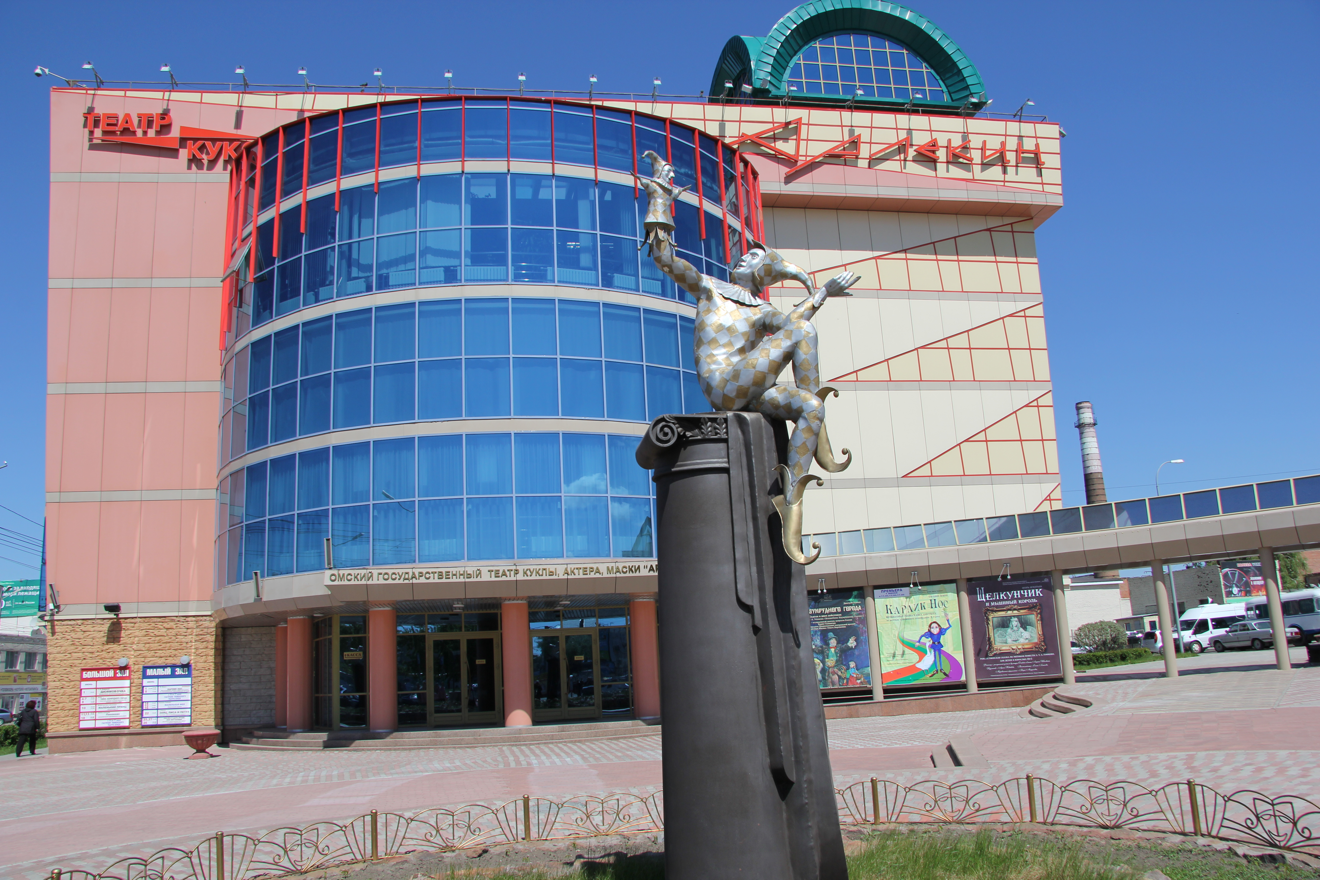 Омский государственный театр куклы, актёра, маски «Арлекин» — один из старейших детских театров России, ведущий свою историю с апреля 1936 года. В репертуаре театра многочисленные постановки для зрителей разного возраста, начиная с двух лет. Спектакли театра отмечены различными призами на российских и международных фестивалях, в том числе престижной премией «Золотая маска».